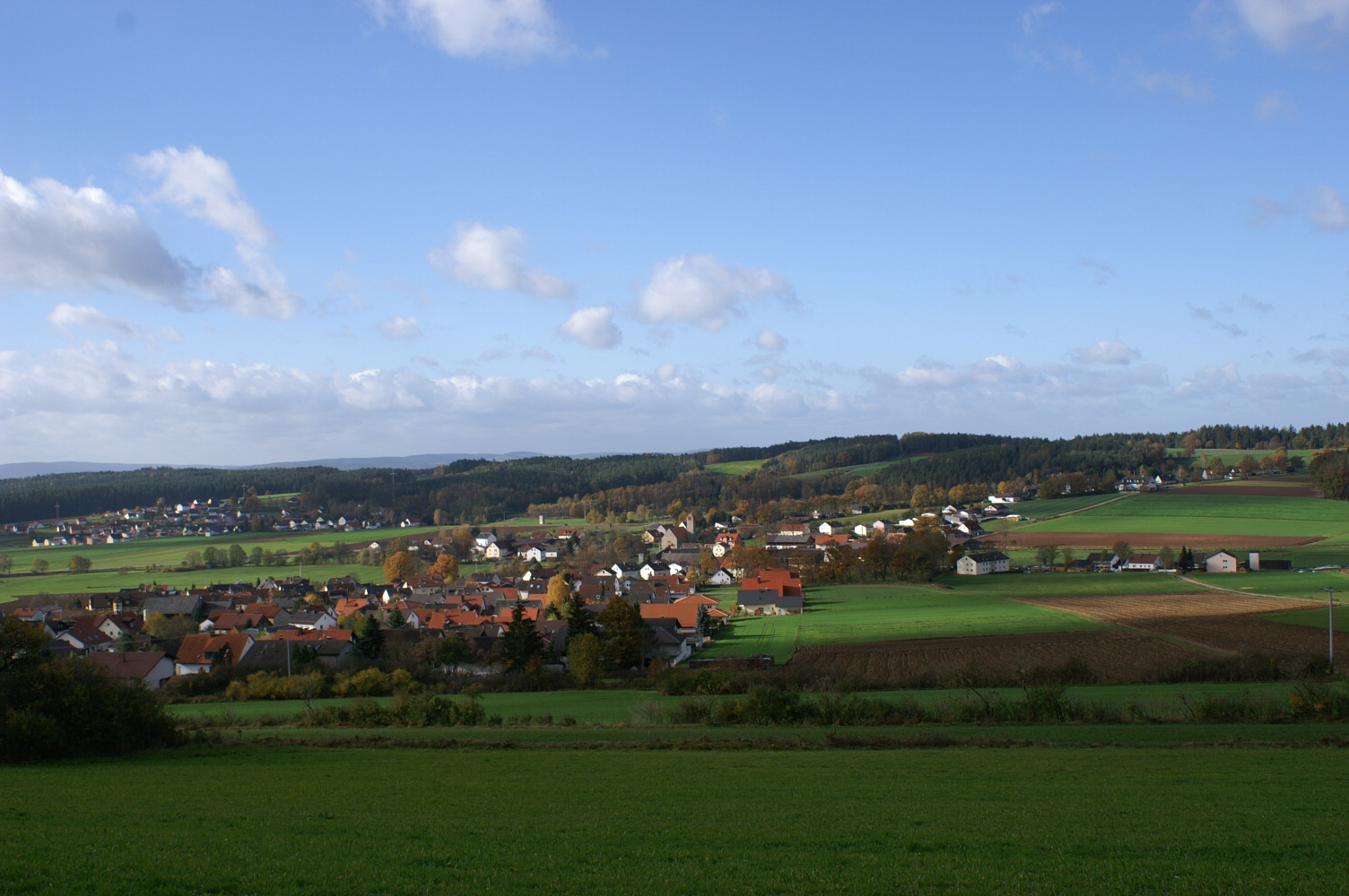 Bechtsrieth und Trebsau (Hintergrund), fotografiert von Nordosten